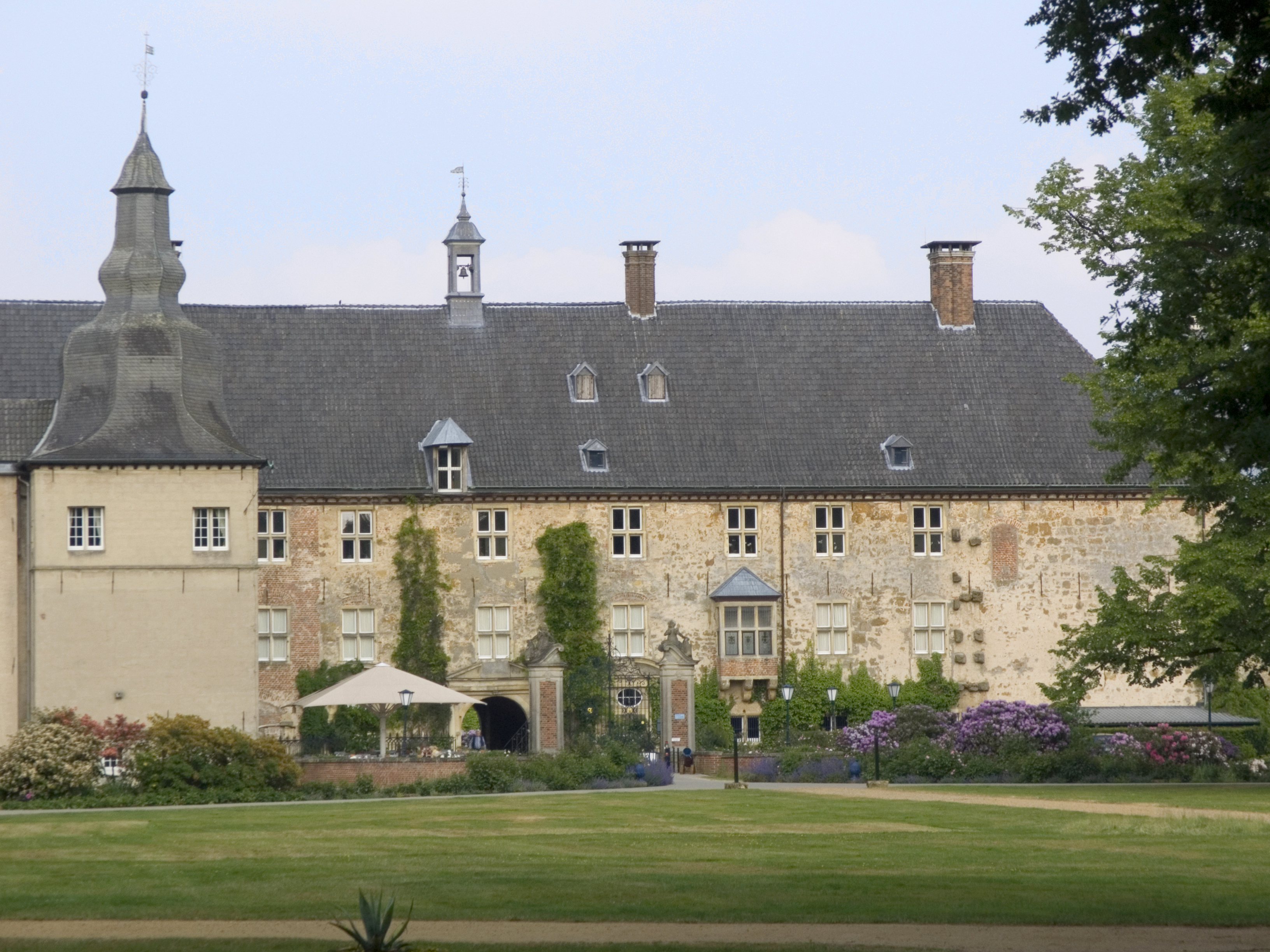 Северный Рейн-Вестфалия, Дорстен - Замок Лембек